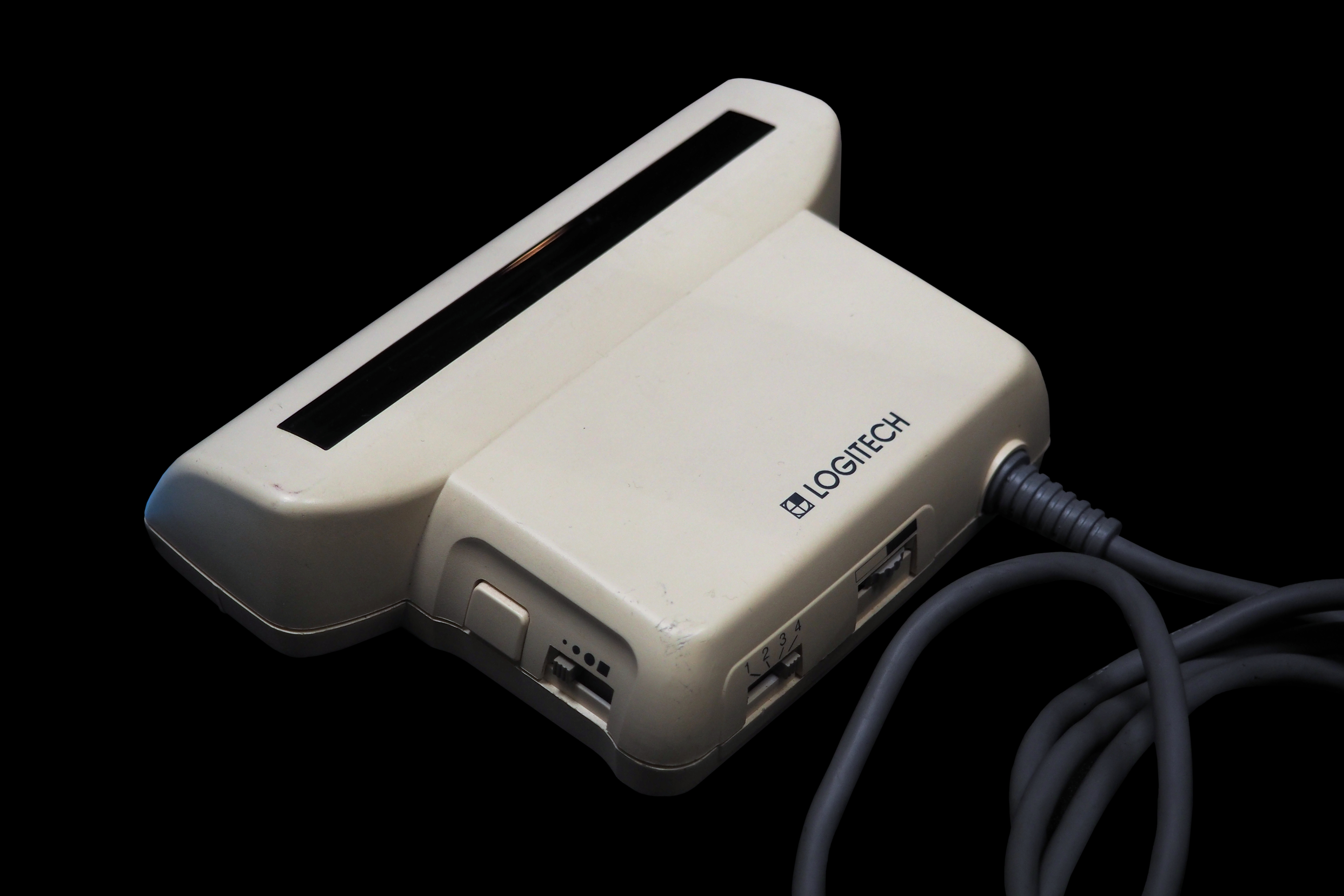 Logitech ScanMan 32-Musée Bolo